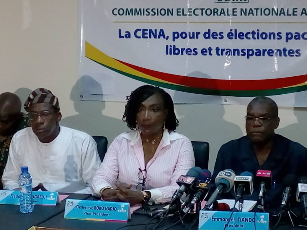 Au siège de la commission électorale lors de la présentation du bulletin unique, à Cotonou, le 4 avril 2019. (VOA/Ginette Fleure Adandé)